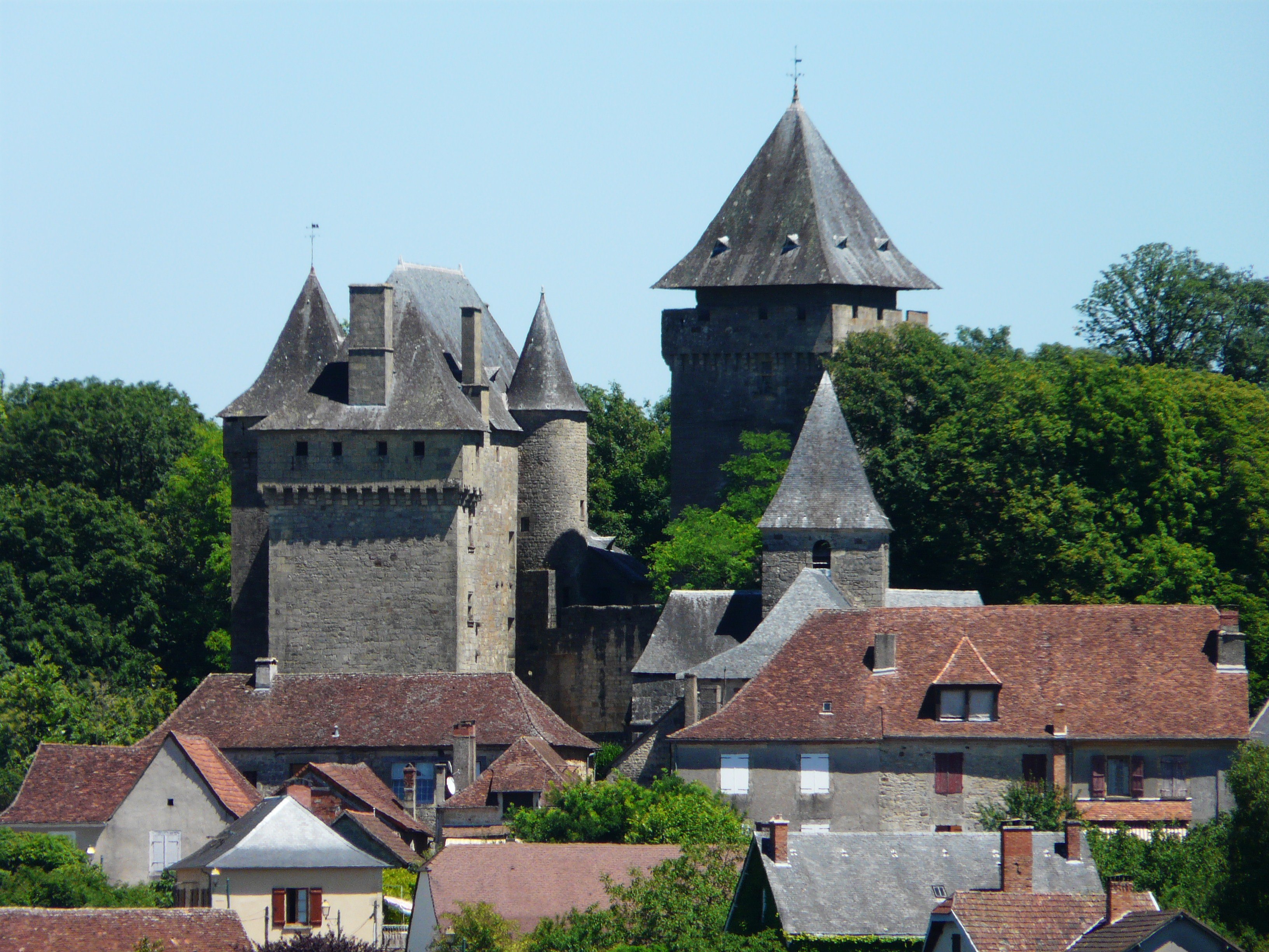 Le château et l'église dominent les toits du village de Badefols-d'Ans, Dordogne, France.